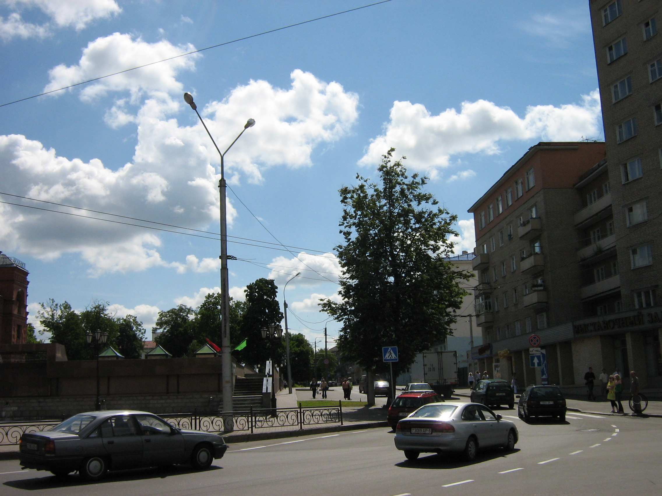 Могилев. Район драмтеатра.